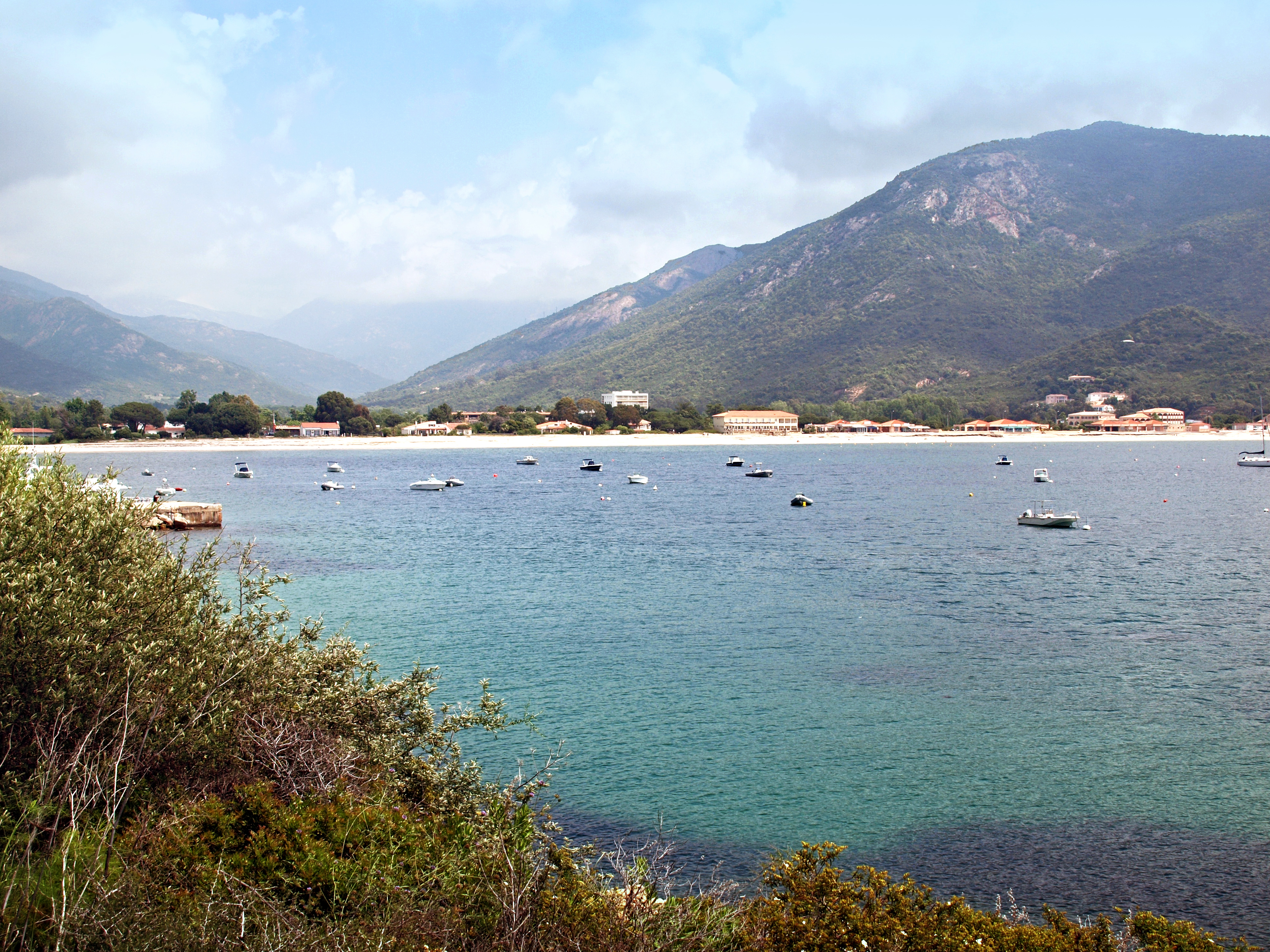 Vico, Ouest Corse (Corse) - Plage de Sagone vue depuis la tour génoise